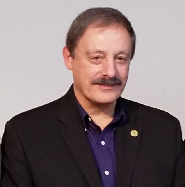 Professor Shahidehpour at Smart Grid Conference 2018